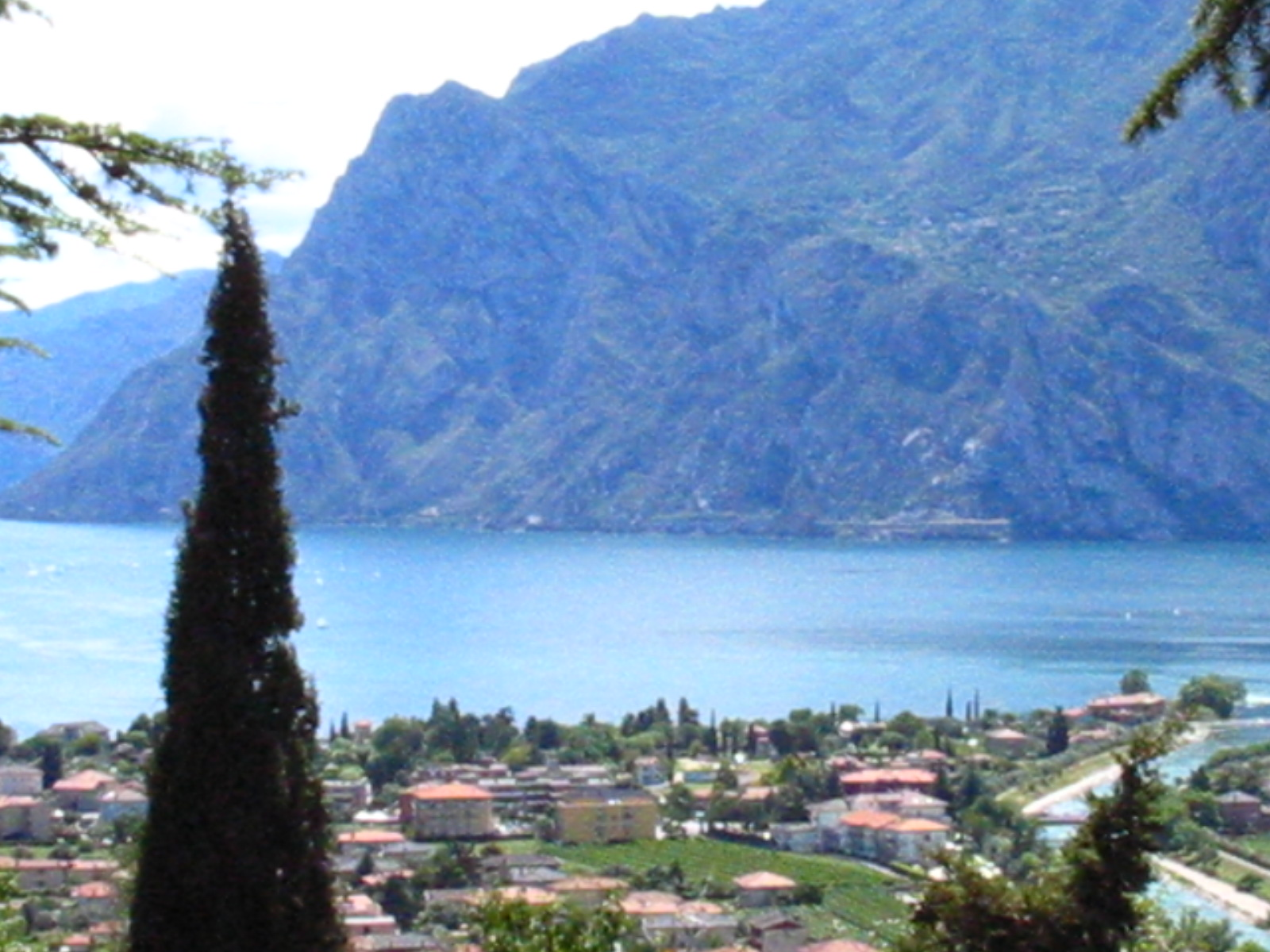 Foto di Torbole sul Garda (TN)